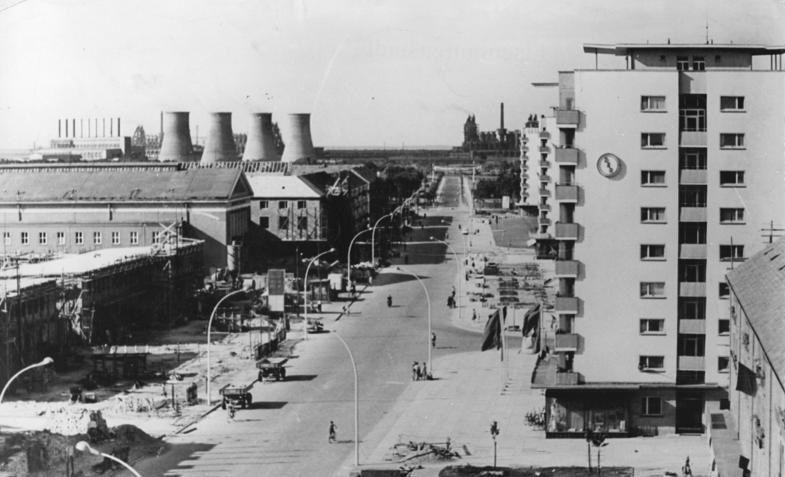 Eisenhüttenstadt, Leninallee, Neubauten Zentralbild Peukert Me-Do 29.7.1960 Die jüngste Stadt Deutschlands, Eisenhüttenstadt. Am 18. August 1960 begeht die erste sozialistische Stadt Deutschlands Eisenhüttenstadt, ihr zehnjähriges Bestehen. Die Einwohnerzahl Eisenhüttenstadts wird bis 1965 um etwa 20000 auf insgesamt 44000 anwachsen. Bis zu diesem Zeitpunkt werden 4295 neue Wohnungen errichtet, davon 90% in Großblockbauweise. Die bereits vorhandenen 5200 Wohnungen sind ausnahmslos mit Bad und in den neuesten Wohnkomplexen mit Zentralheizung und Einbauküchen versehen. UBz: Blick auf die Neubauten in der Leninallee. Im Hintergrund die Schornsteine des Eisenhüttenkombinats Eisenhüttenstadt.